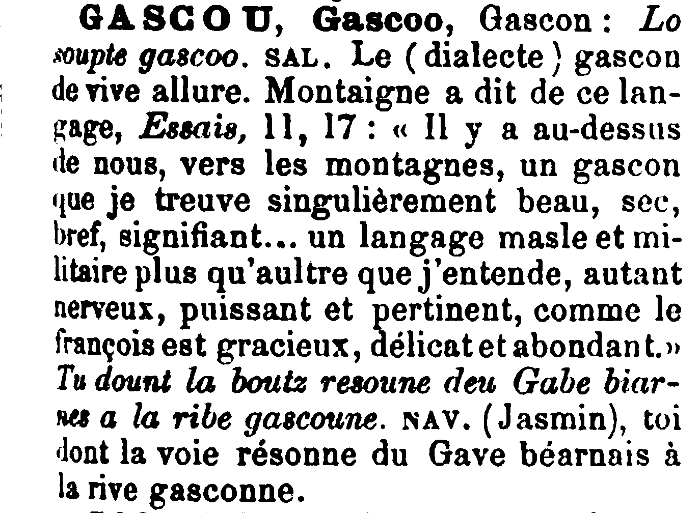 Article Gascou dans le dictionnaire béarnais de Vastin Lespy